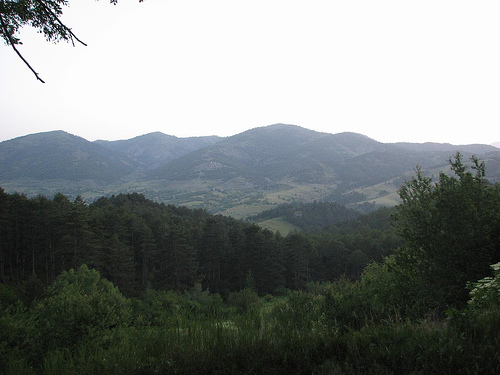 Voskopoja